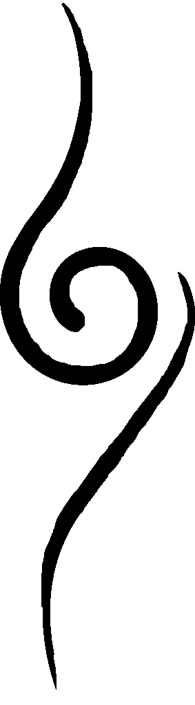 tatouage porté sur le bras gauche des ANBU